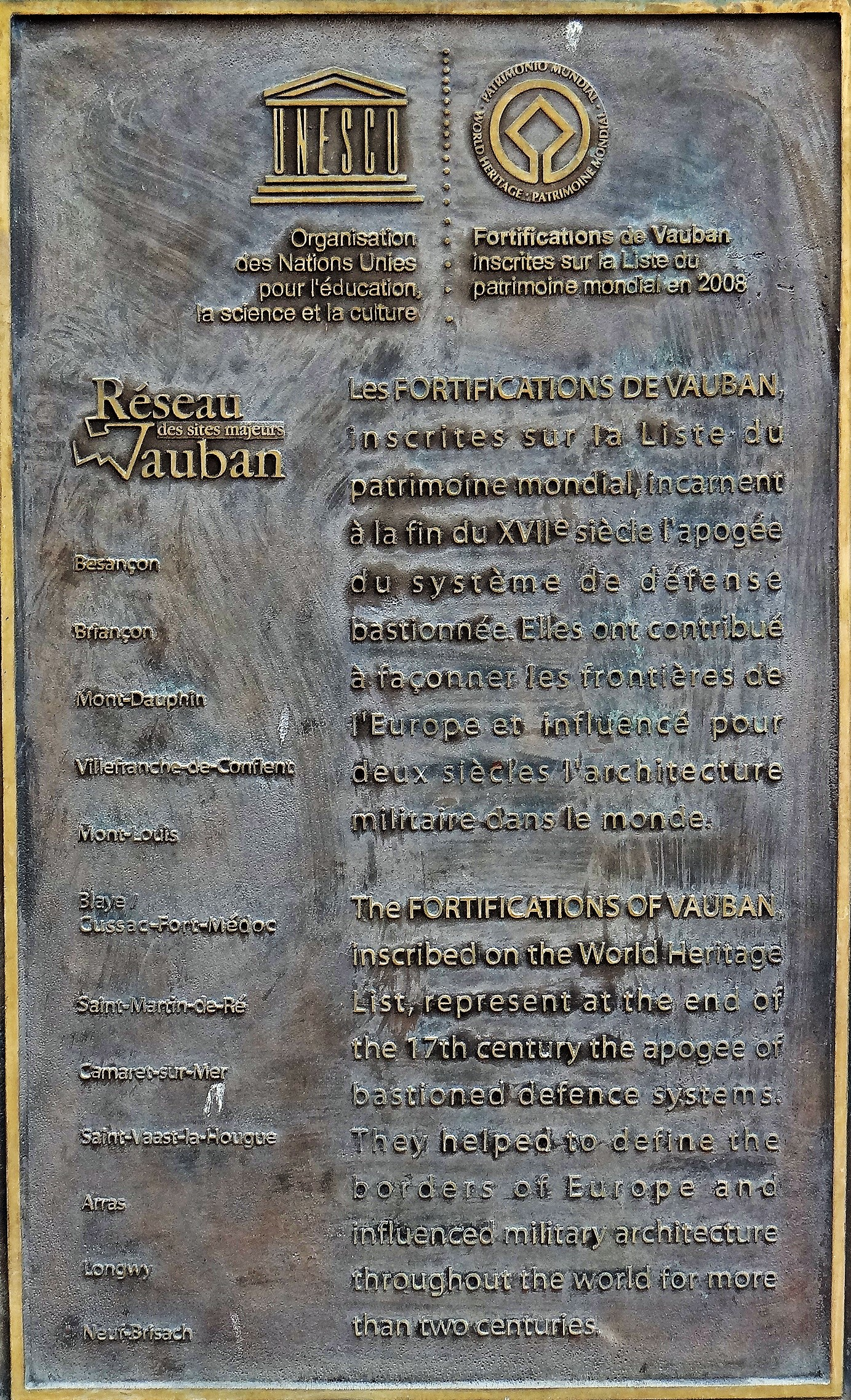 Mont-Louis - Fortifications - UNESCO : Classement au patrimoine mondial